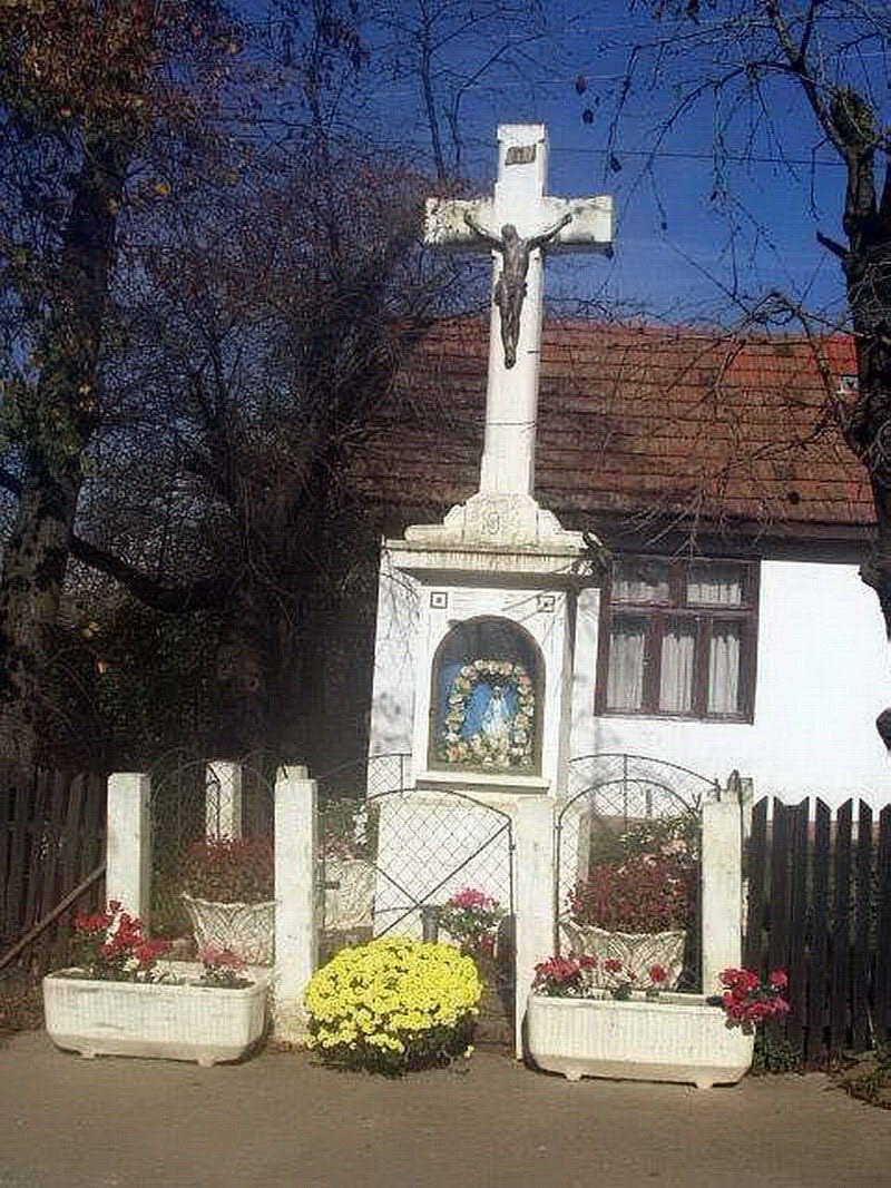 Zabrđe - Raspelo